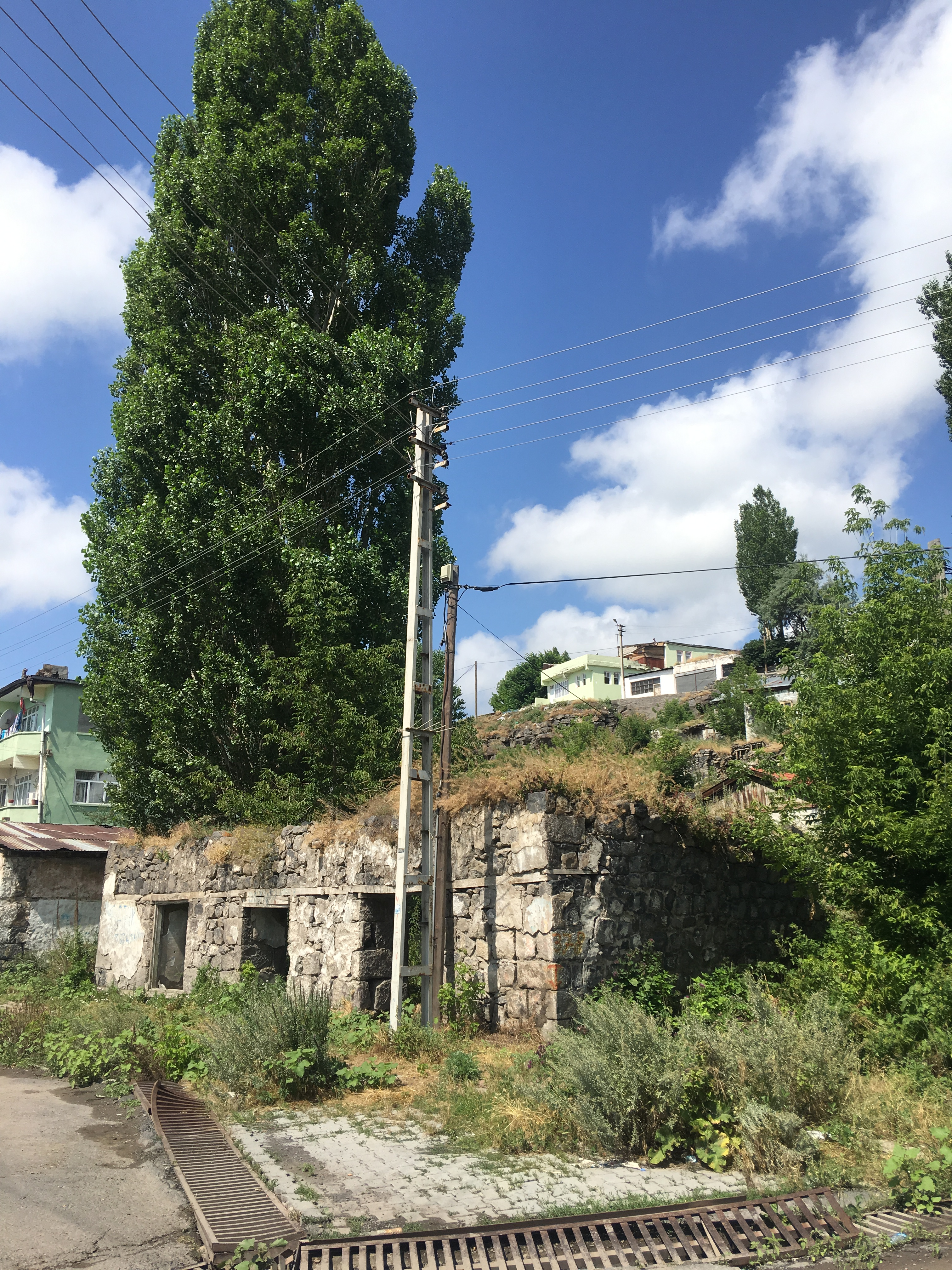 Եղիշե Չարենցի տունը Կարսում, Էրզրումի փողոց (Erzurum Cd.)